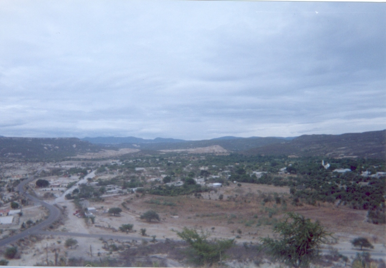 Vista de Zacapala